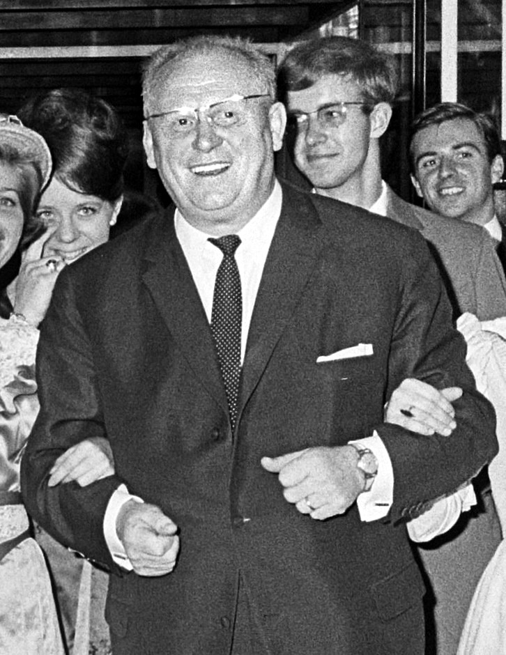 L'acteur allemand Gert Fröbe à une première du film Ces merveilleux fous volants dans leurs drôles de machines, le 15 juillet 1965.